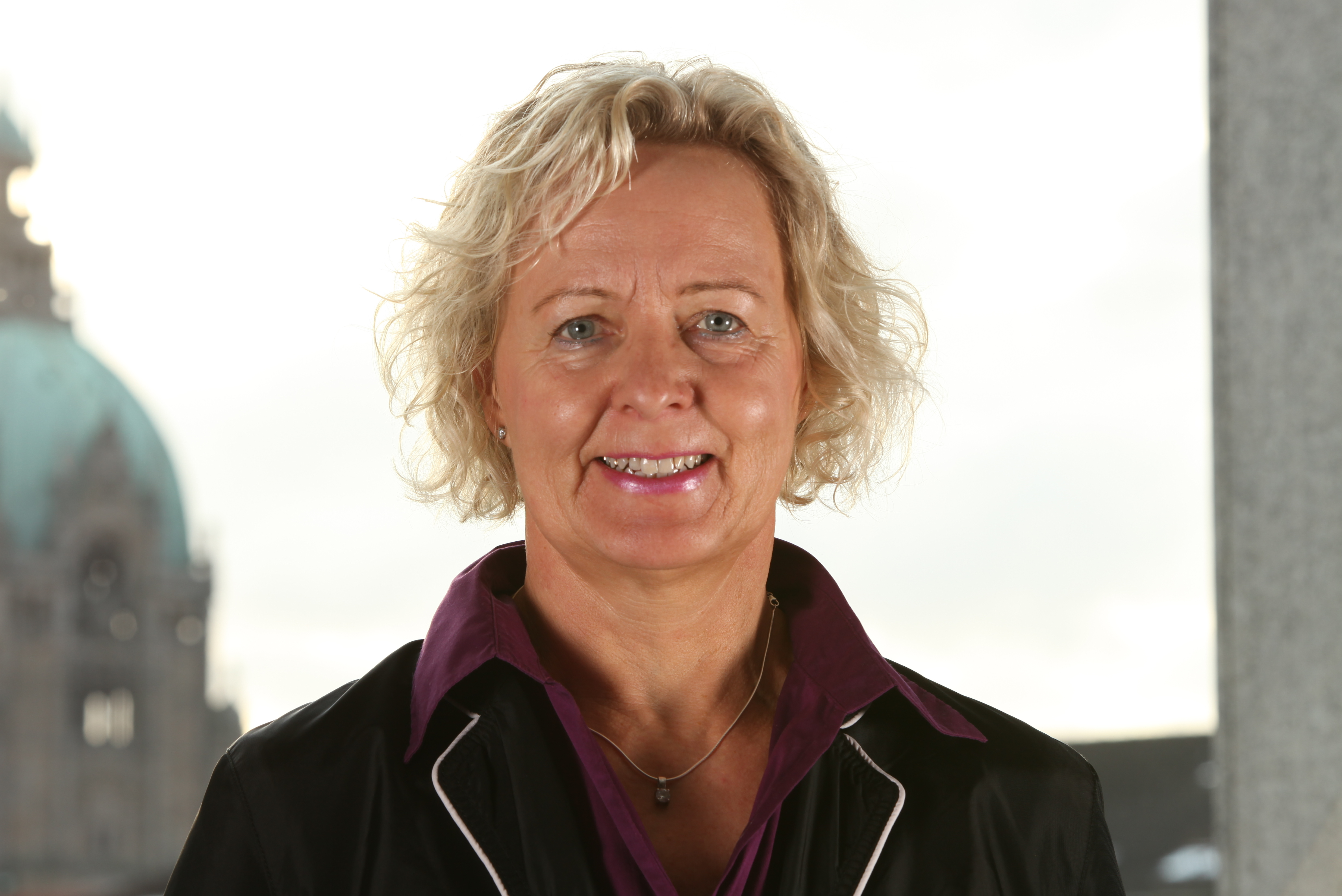 Ina Korter, Abgeordnete des niedersächsischen Landtages (B90/Die Grünen)